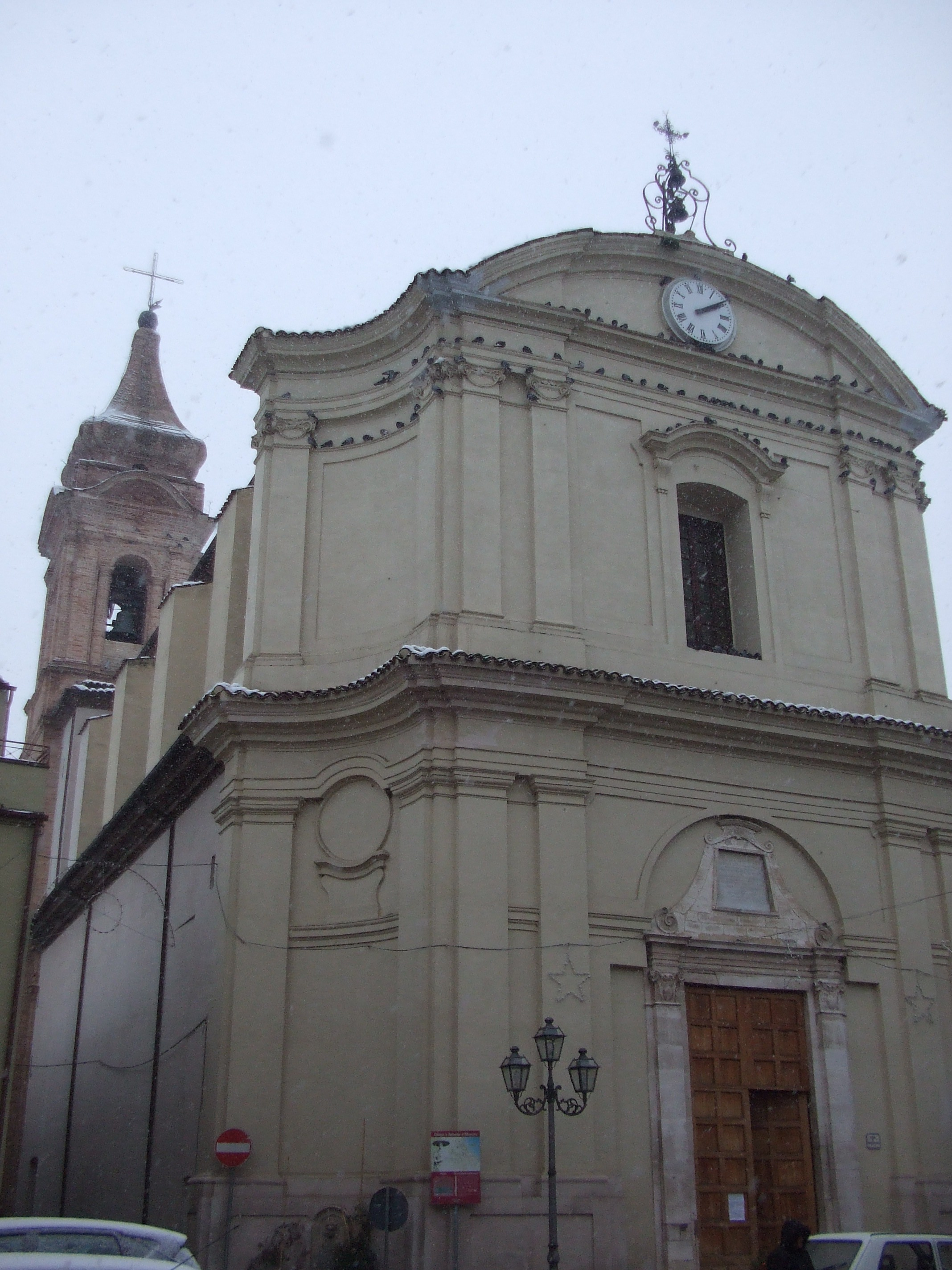 Chiesa di Santa Maria degli Angeli di Bisenti sotto la neve